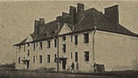 Беларуская (тарашкевіца): Гарадзея (Haradzieja), вуліца Вакзальная (vulica Vakzalnaja). Жылы дом